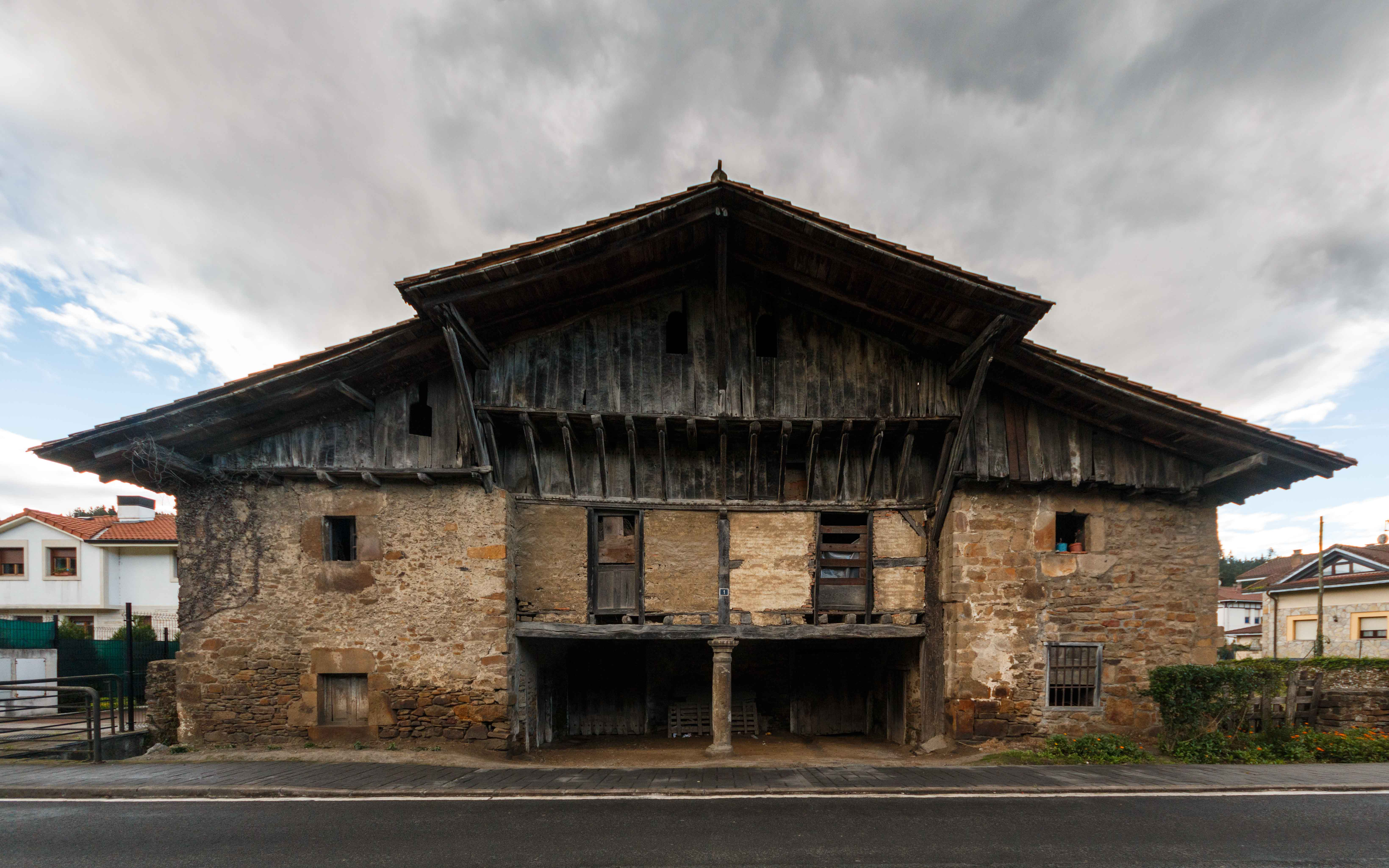 Luiaondoko 52 zenbakia duen baserria